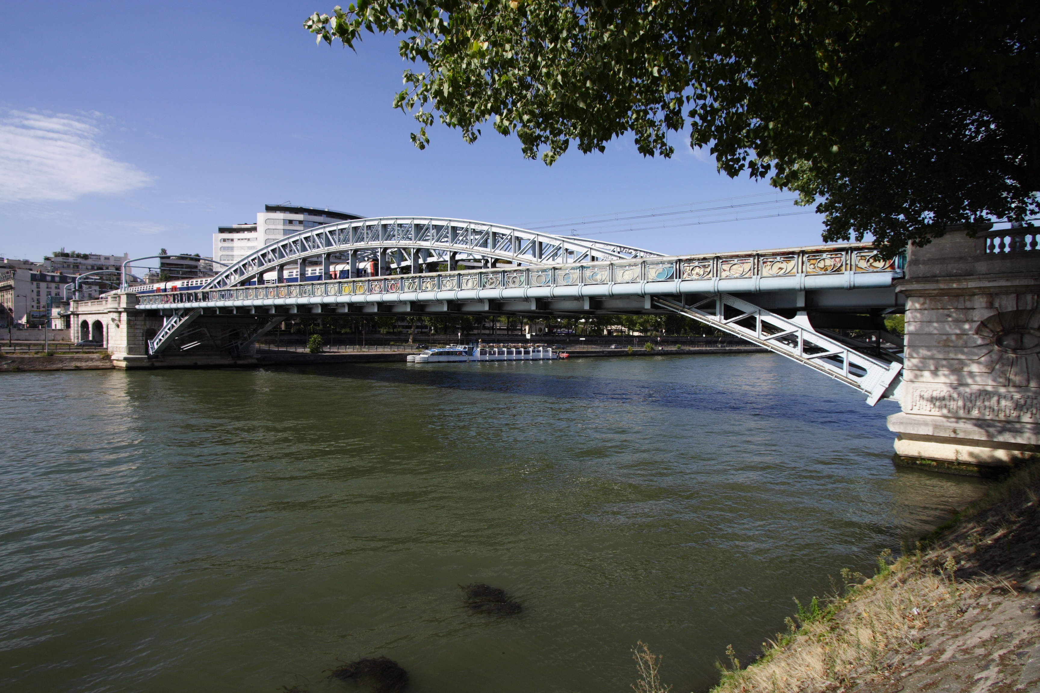 Pont Rouelle(Paris, France)